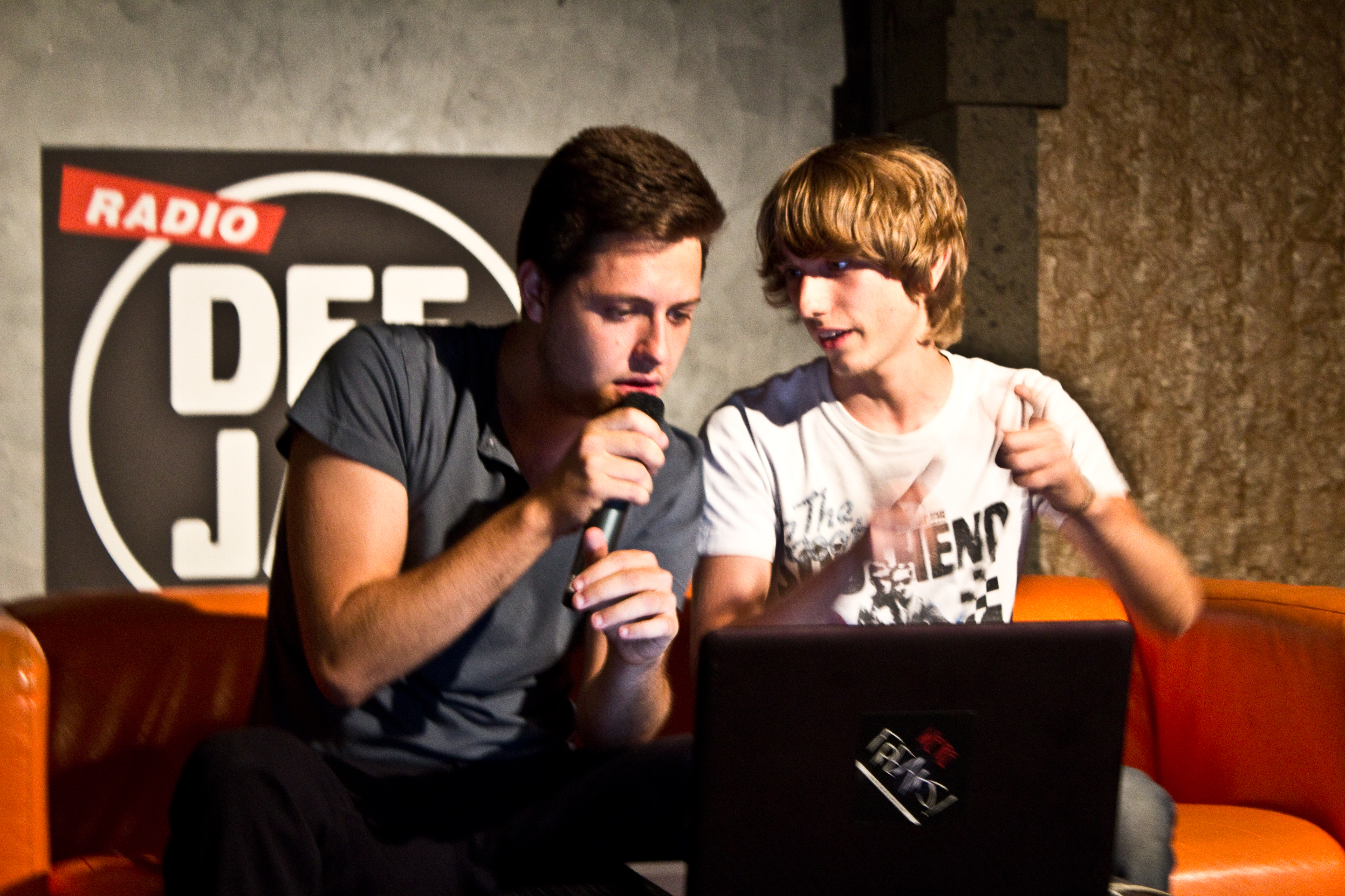 Secret Show di Freaks al Blackout di Roma. Claudio di Biagio (Nonapritequestotubo) e Matteo Bruno (canesecco).